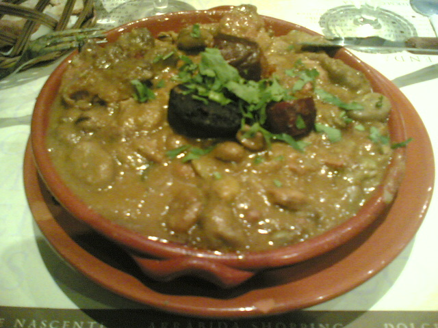 "Favas com chouriço", a portuguese dish